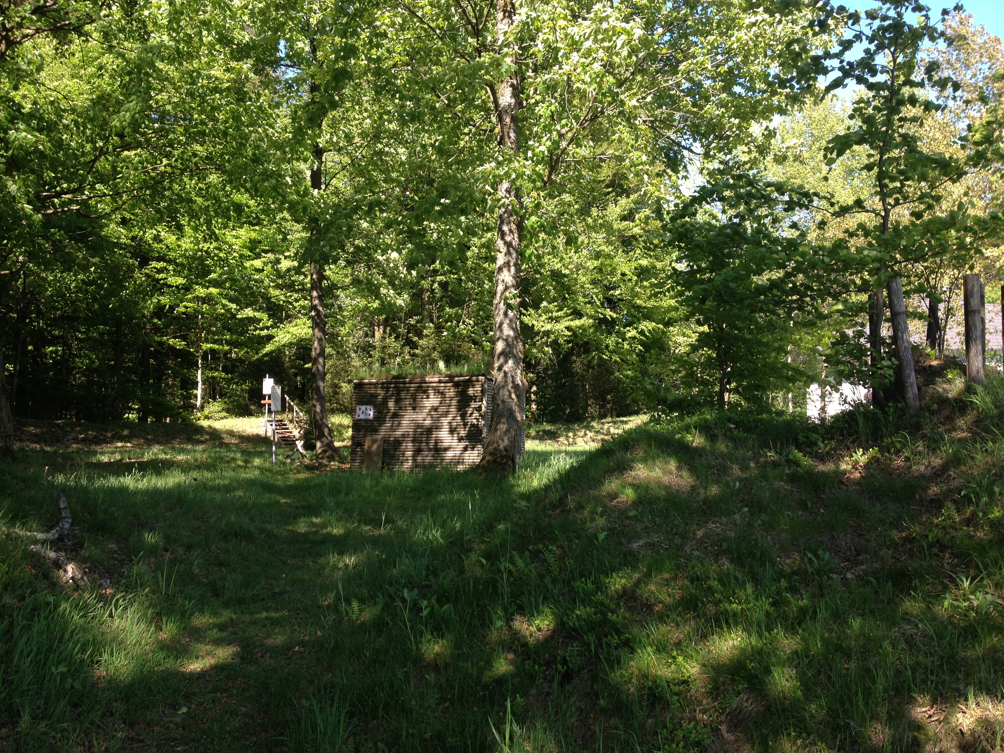 kleine Sternschanze in Oberhaag